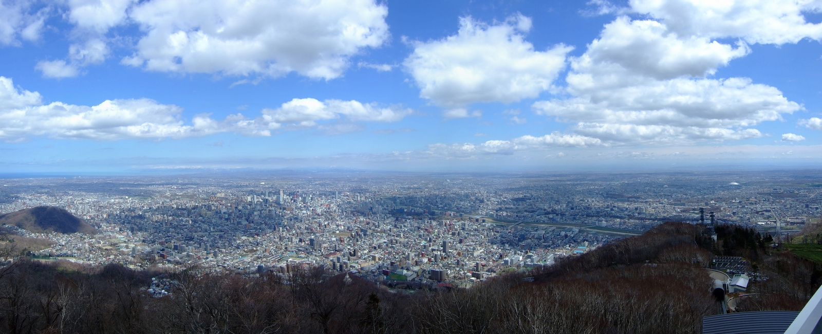 藻岩山展望台 (moiwa Mountain)